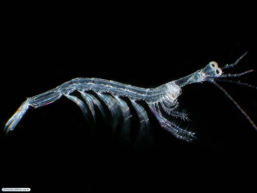 Imagem de um camarão da família Luciferidae, superfamília Sergestoidea